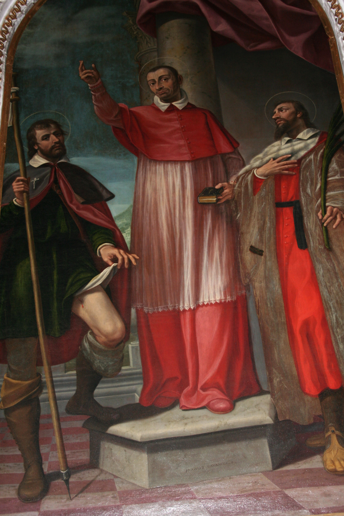 Gian Paolo Cavagna, S. Carlo Borromeo tra S. Rocco e S. Pantaleone, Santuario della Madonna del castello di Almenno San Salvatore.